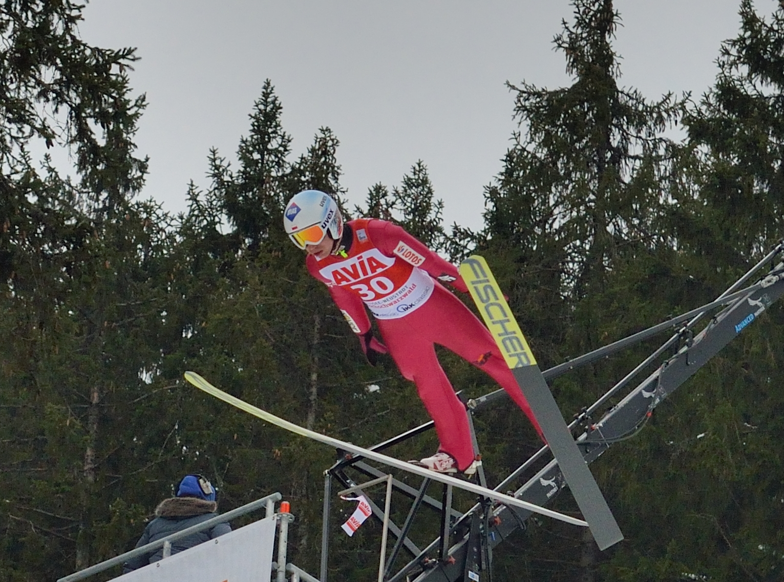 FIS Ski Weltcup Titisee-Neustadt 2016: Kamil Stoch